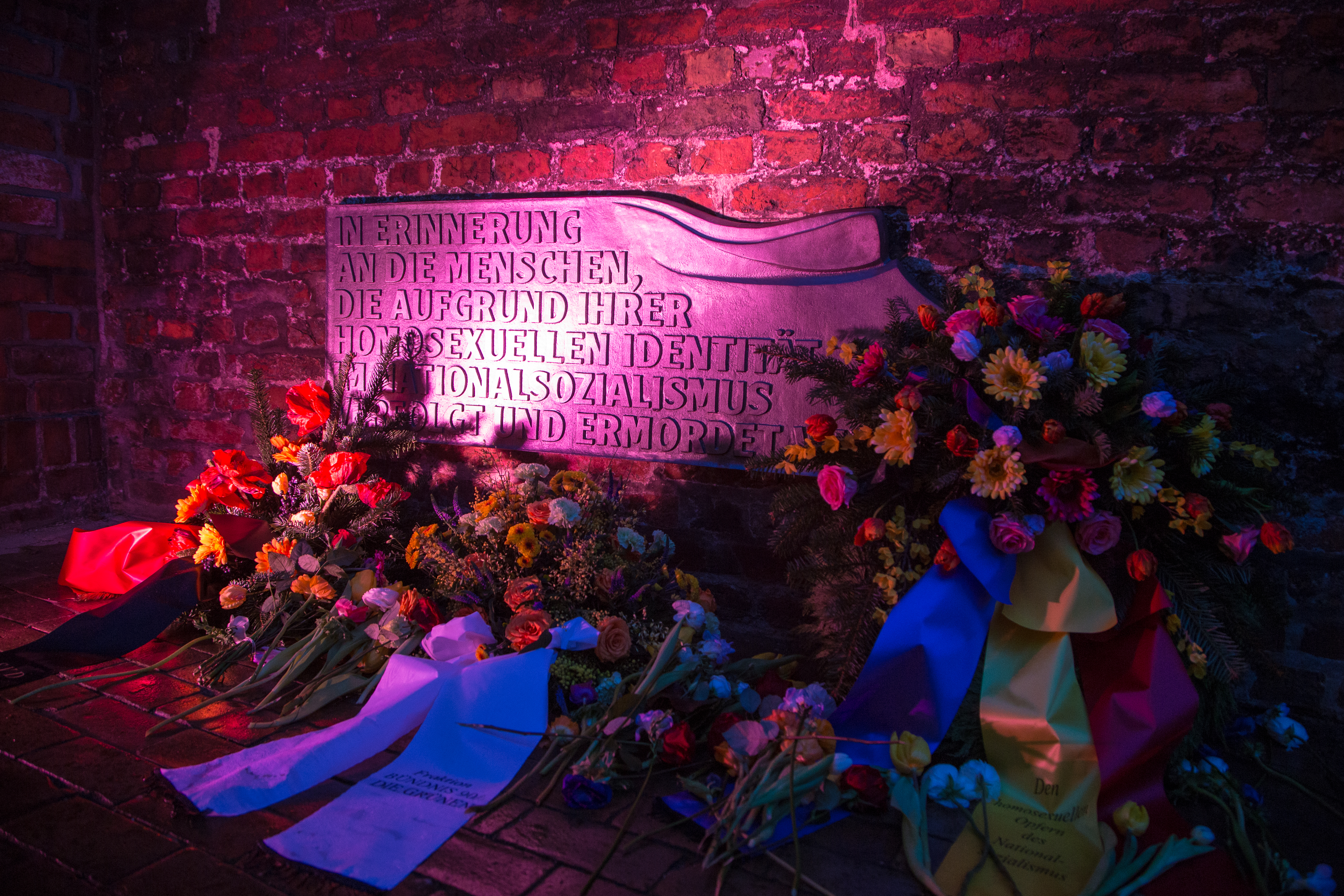 Am Sonnabend, 23. Januar 2016 wurde das neue Denkmal für im Nationalsozialismus verfolgte Homosexuelle in Lübeck enthüllt. Zur feierlichen Übergabe an die Öffentlichkeit trafen sich ca. 200 Vertreter*innen aus Bundes-, Landes- und Kommunalpolitik, aus Vereinen und Organisationen sowie viele Unterstützer*innen und Gäste.